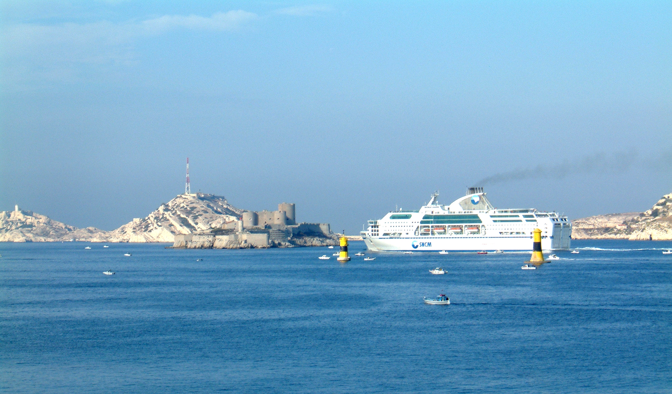 Marseille, Der Tourismus erreicht das Château_d'If